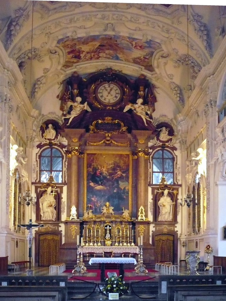 Chorraum der Pfarrkirche St. Benedikt zu Benediktbeuern